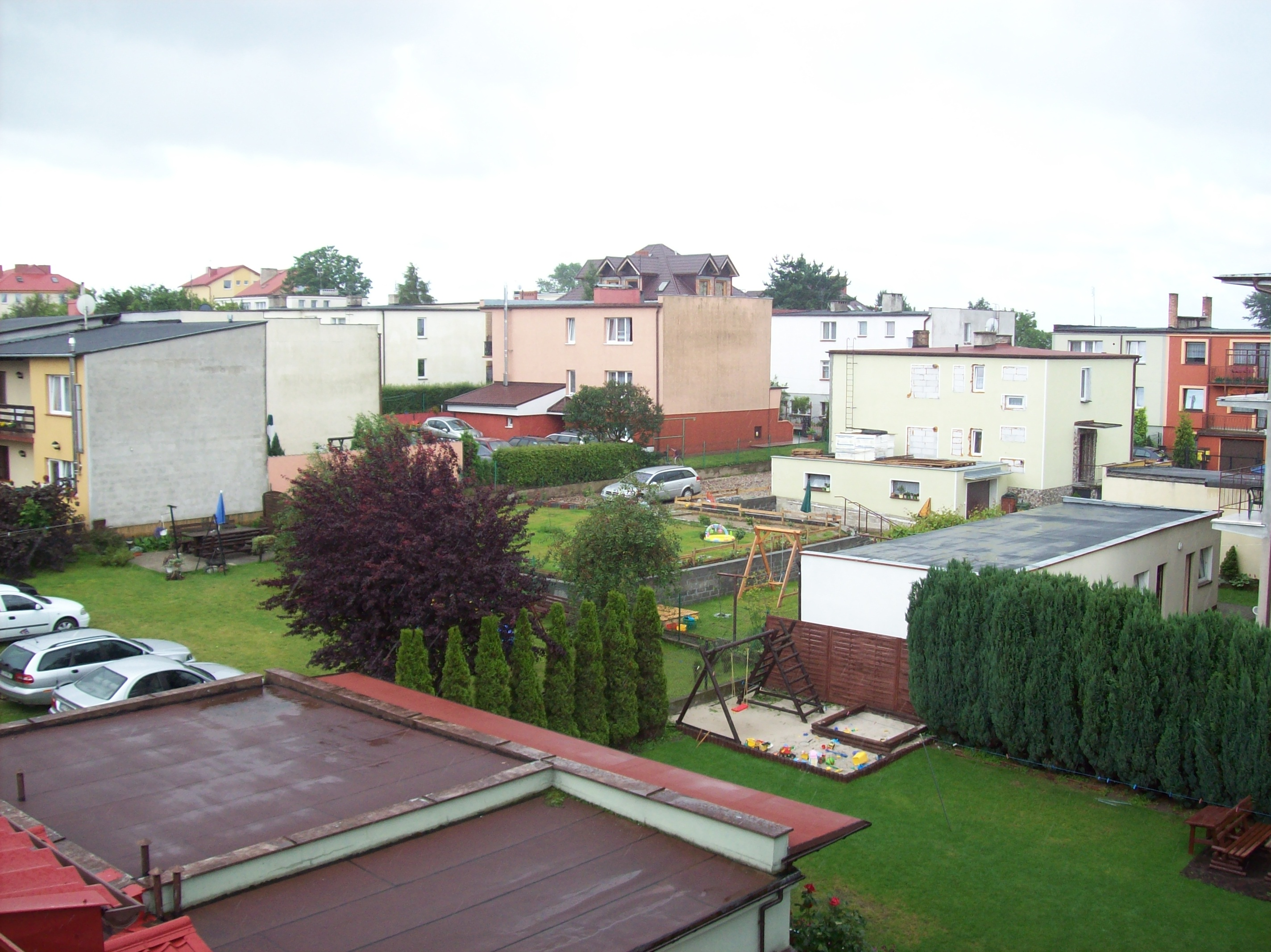 Jastrzębia Góra, Polska / Poland / Polsko